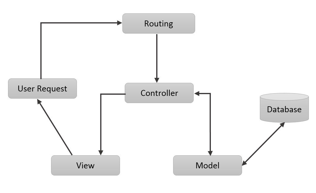 লারাভেলের আর্কিটেকচার